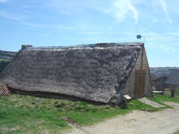 Jasserie du Coq noir parmi les jasseries du Grand Genévrier dans la commune de Saint-Anthème (63660)